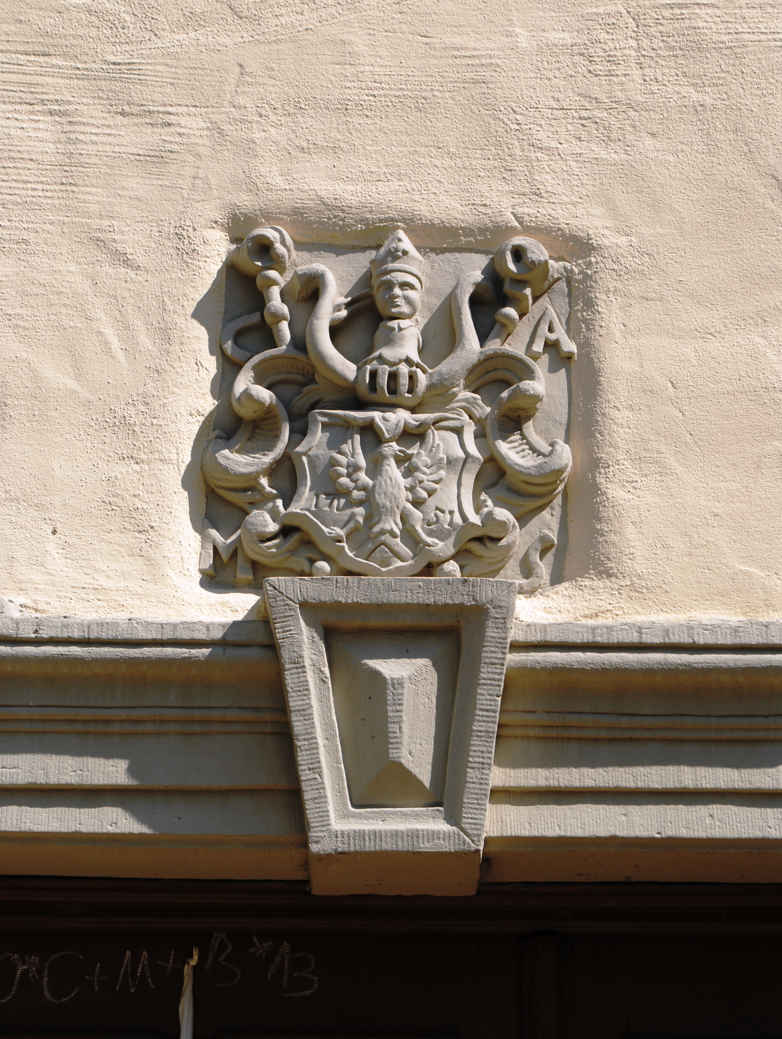 Wappen, Zehnthof Sommerach, HauptstraßeThis is a photograph of an architectural monument.